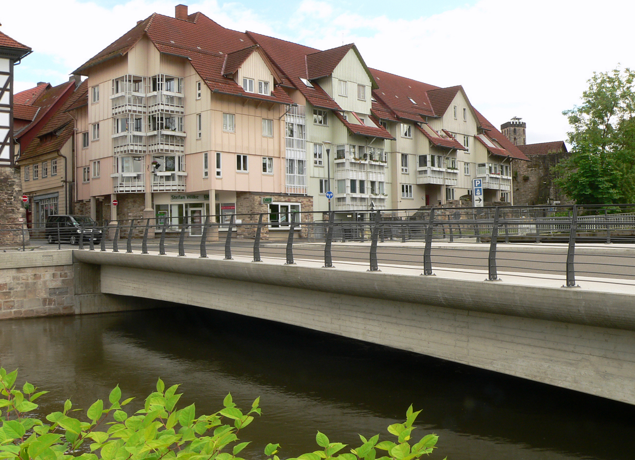 Die Neue Löwenbrücke in Hann. Münden, rechts dahinter die Alte Löwenbrücke mit dem Brückenlöwen am Ufer